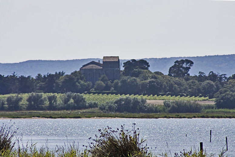 Cathédrale_de_Maguelone von O